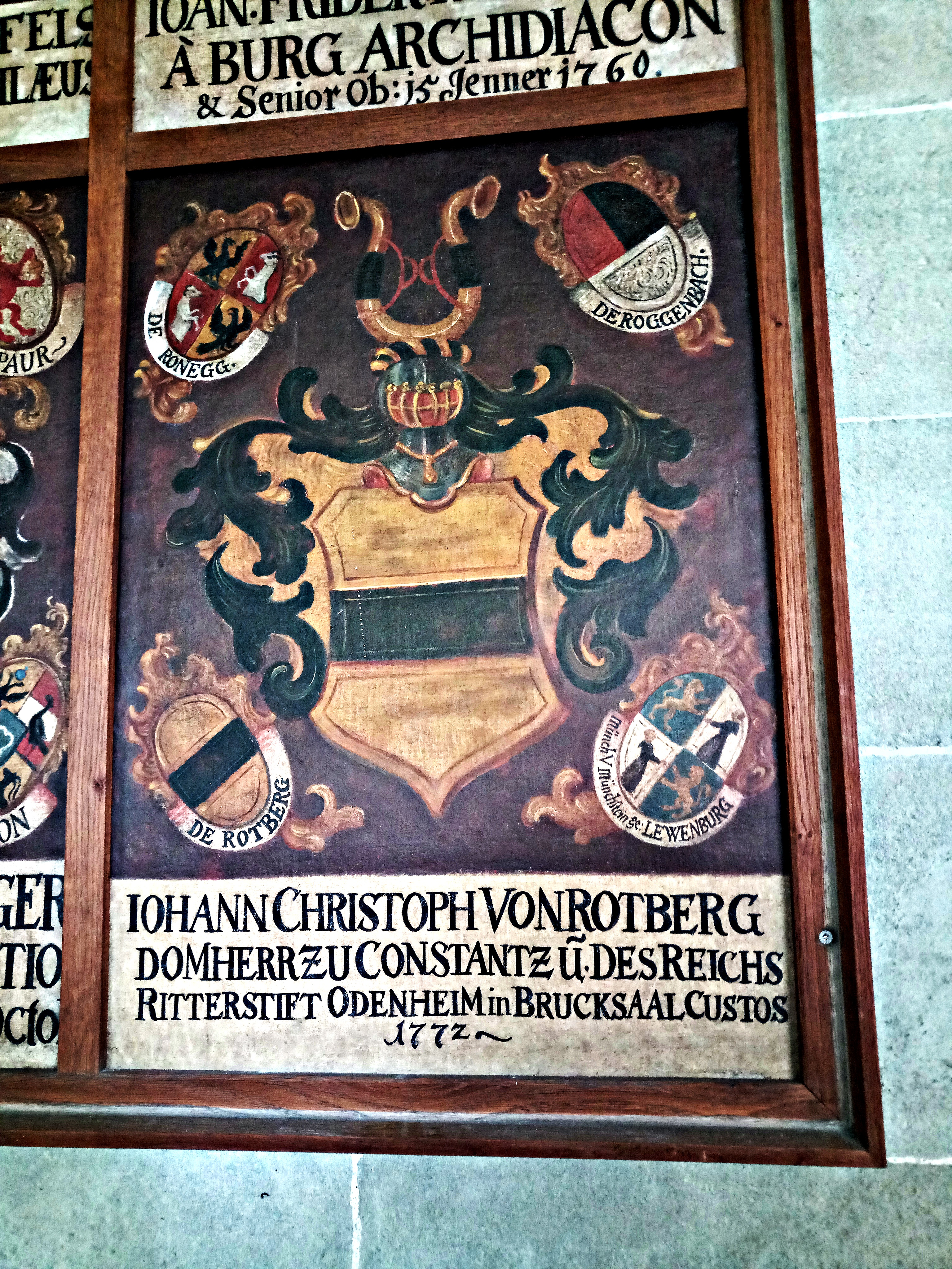 Totentafel des Domherrn Johann Christoph von Rotberg (1720-1772), im Konstanzer Münster-Kreuzgang